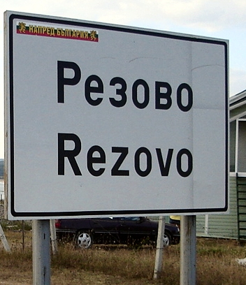 Rezovo sign, Bulgaria